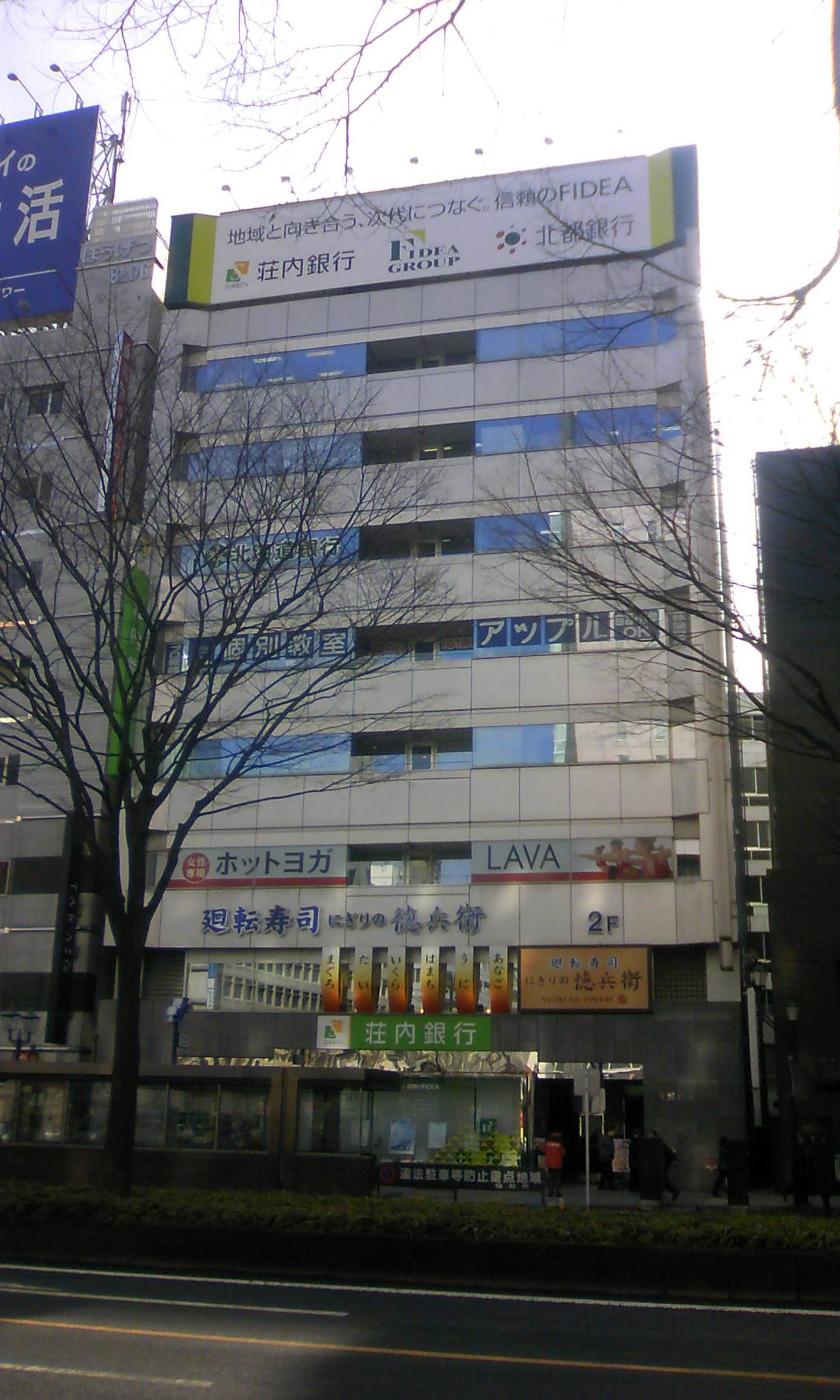 宮城県仙台市青葉区にある荘銀ビル